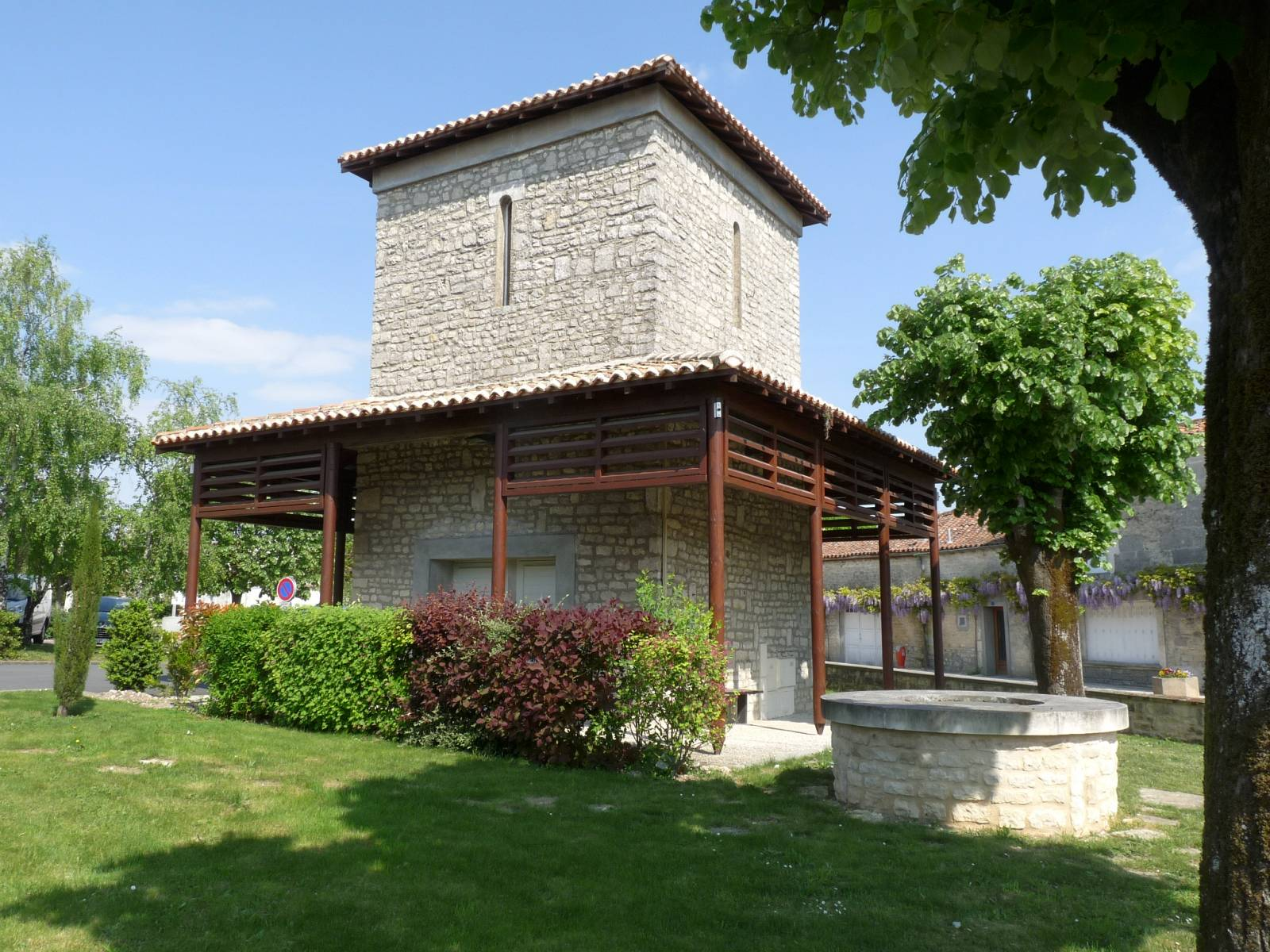 Bâtiment communal et puits à Foussignac, Charente, France